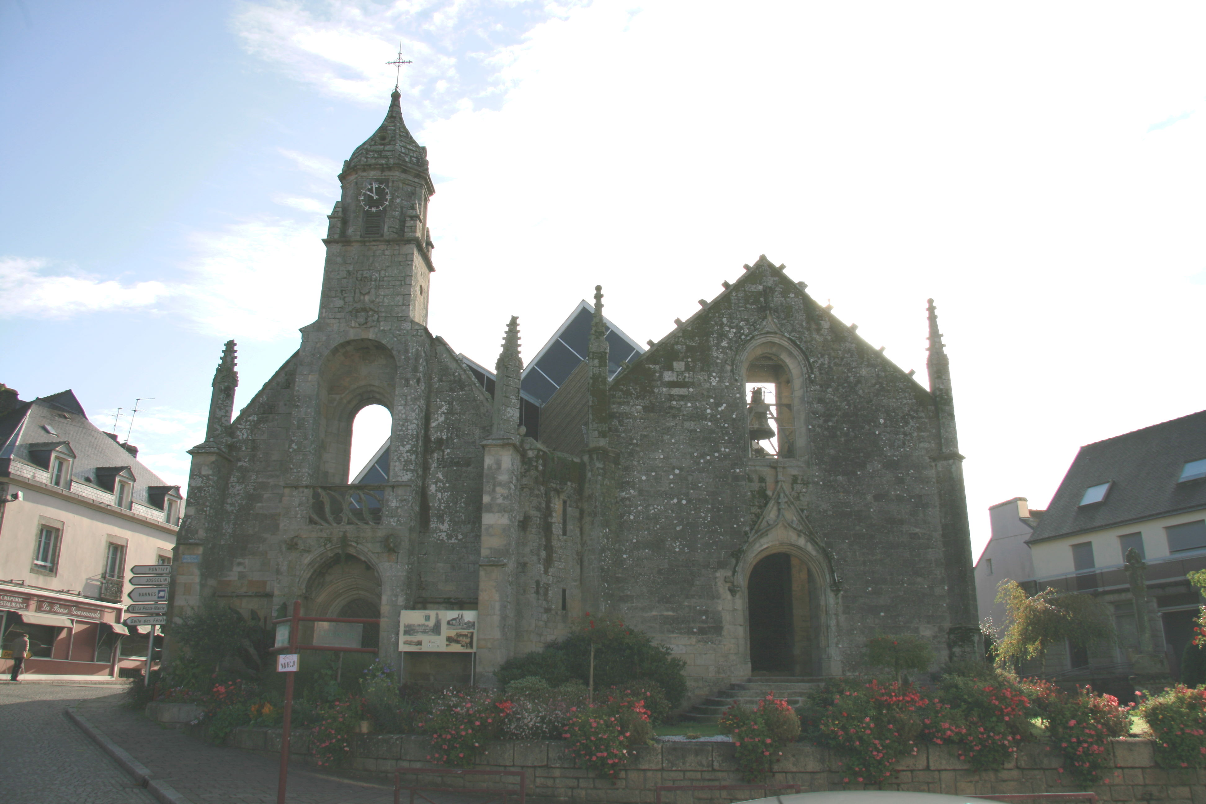 Église Saint-Sauveur - Locminé - Morbihan - Bretagne